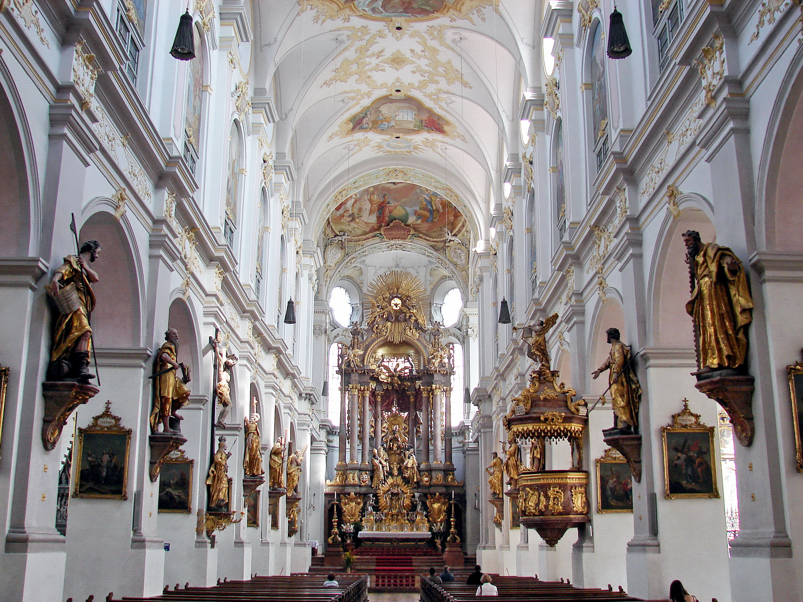 Kirche Sankt Peter: Innenraum)